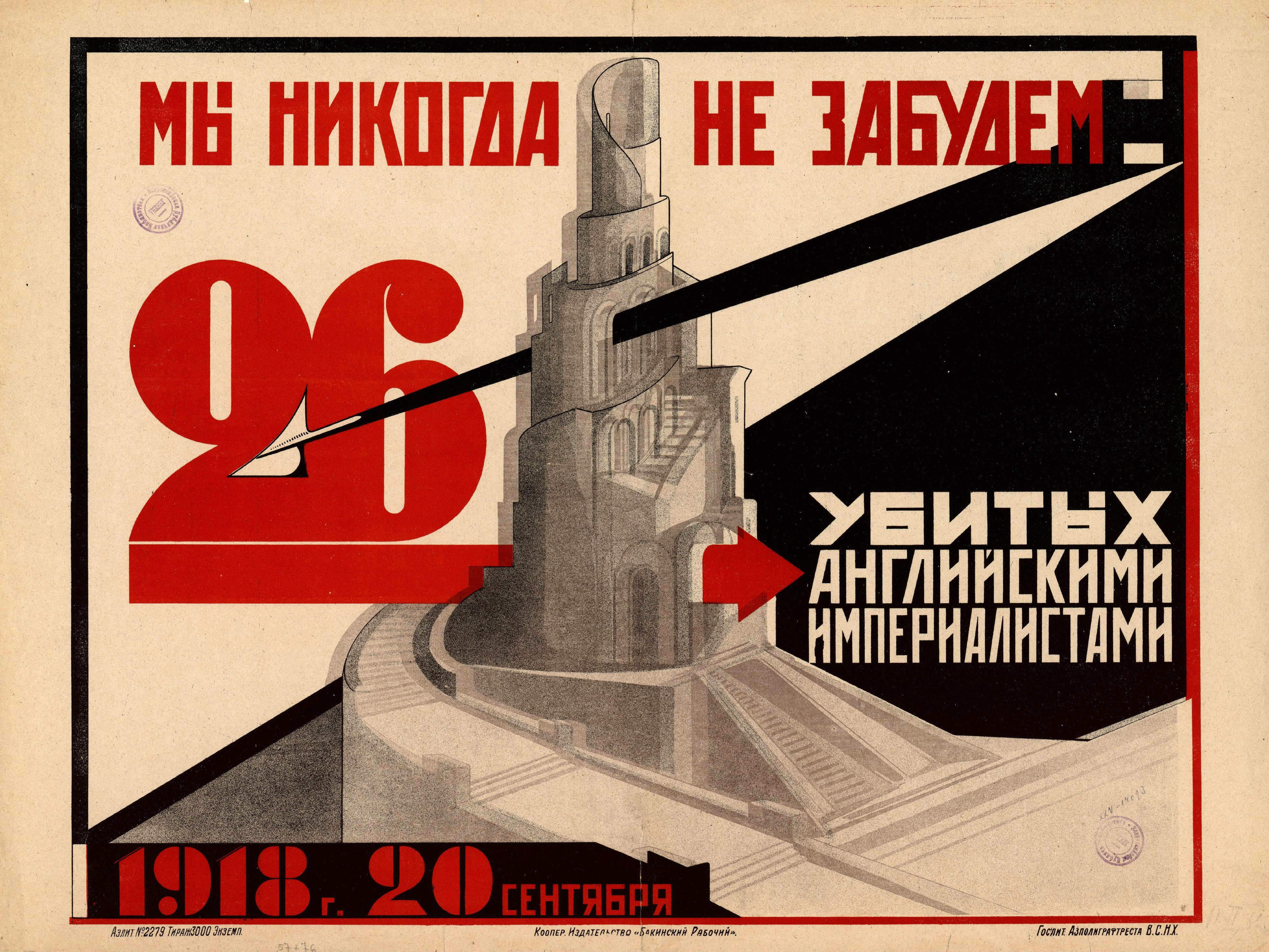 Плакат «Мы никогда не забудем 26 убитых английскими империалистами. 1918 г., 20 сентября». Баку : Кооперативное издательство «Бакинский рабочий», [1925] (Гос. литография Азполиграфтреста ВСНХ). Цветная литография, 1 лист, 57×76 см, 3000 экз.